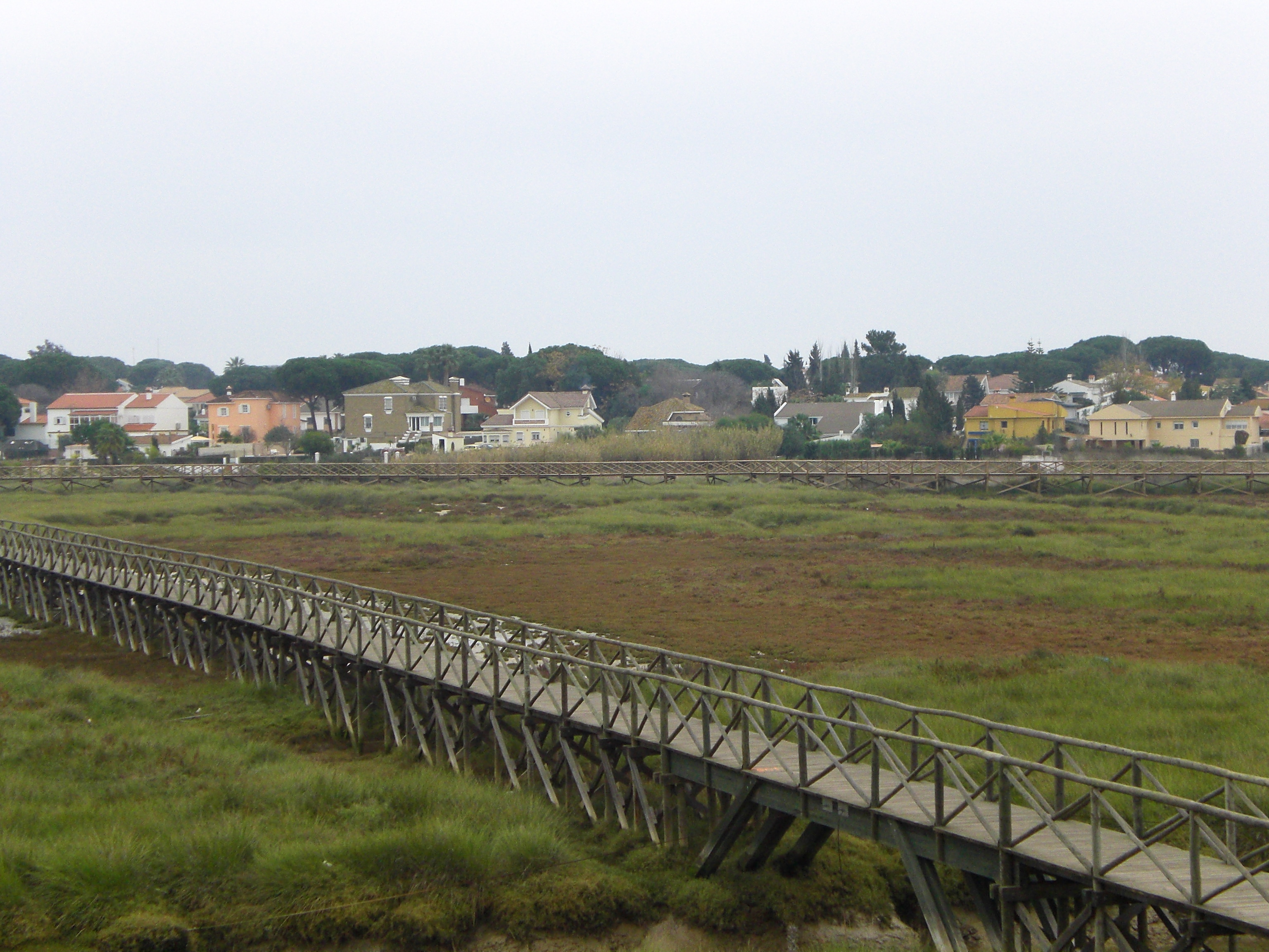 Vista de la marisma y Bellavista al fondo, desde Las Cojillas